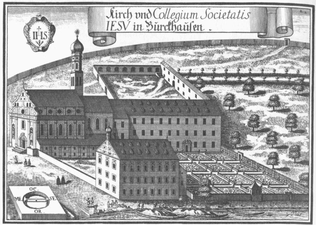 Jesuitenkirche von Burghausen nach einem einem Kupferstich von Michael Wening von (1721)